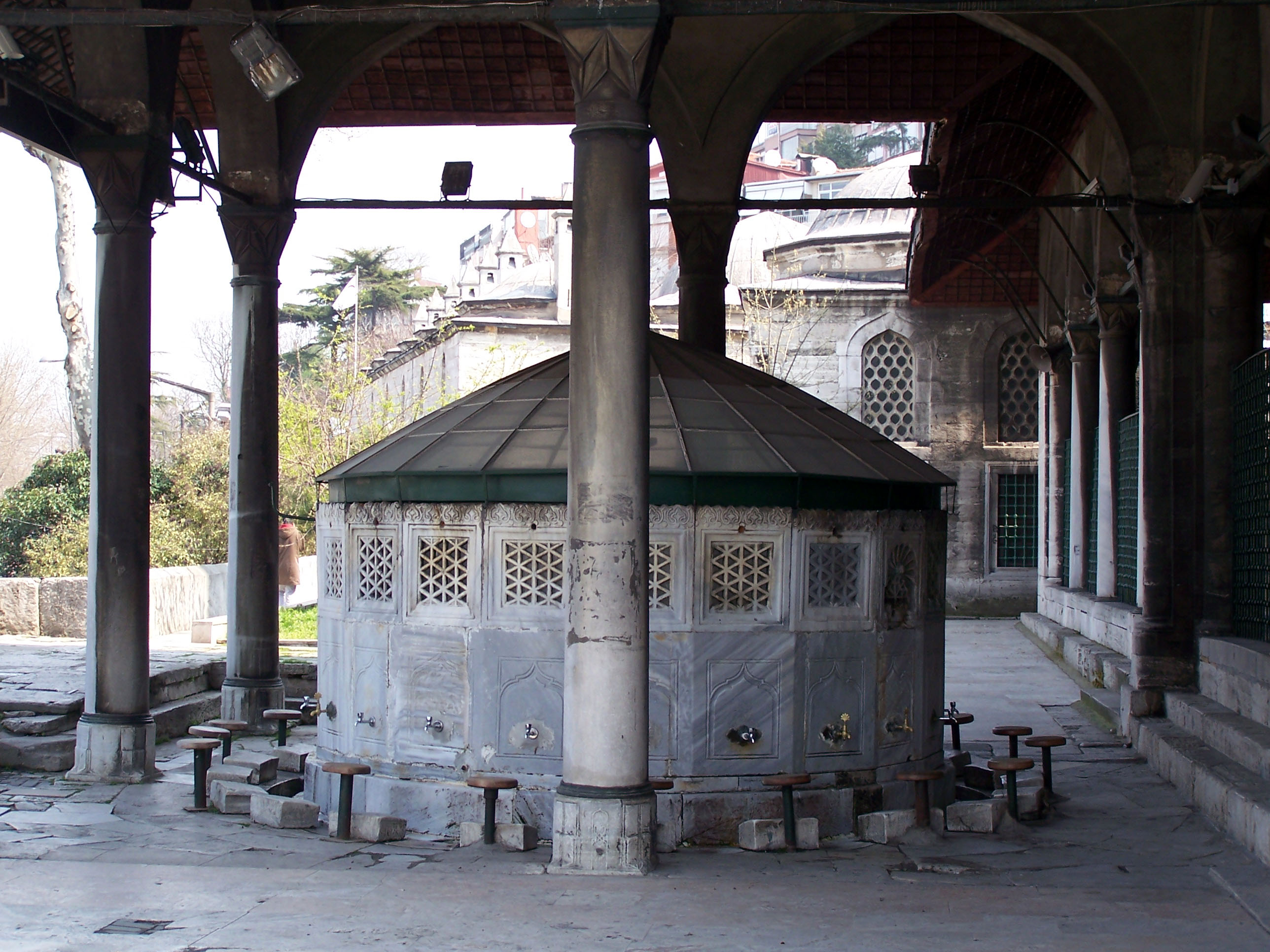 Şadırvan of Mihrimah Sultan Camii in Üsküdar, İstanbul, Turkey